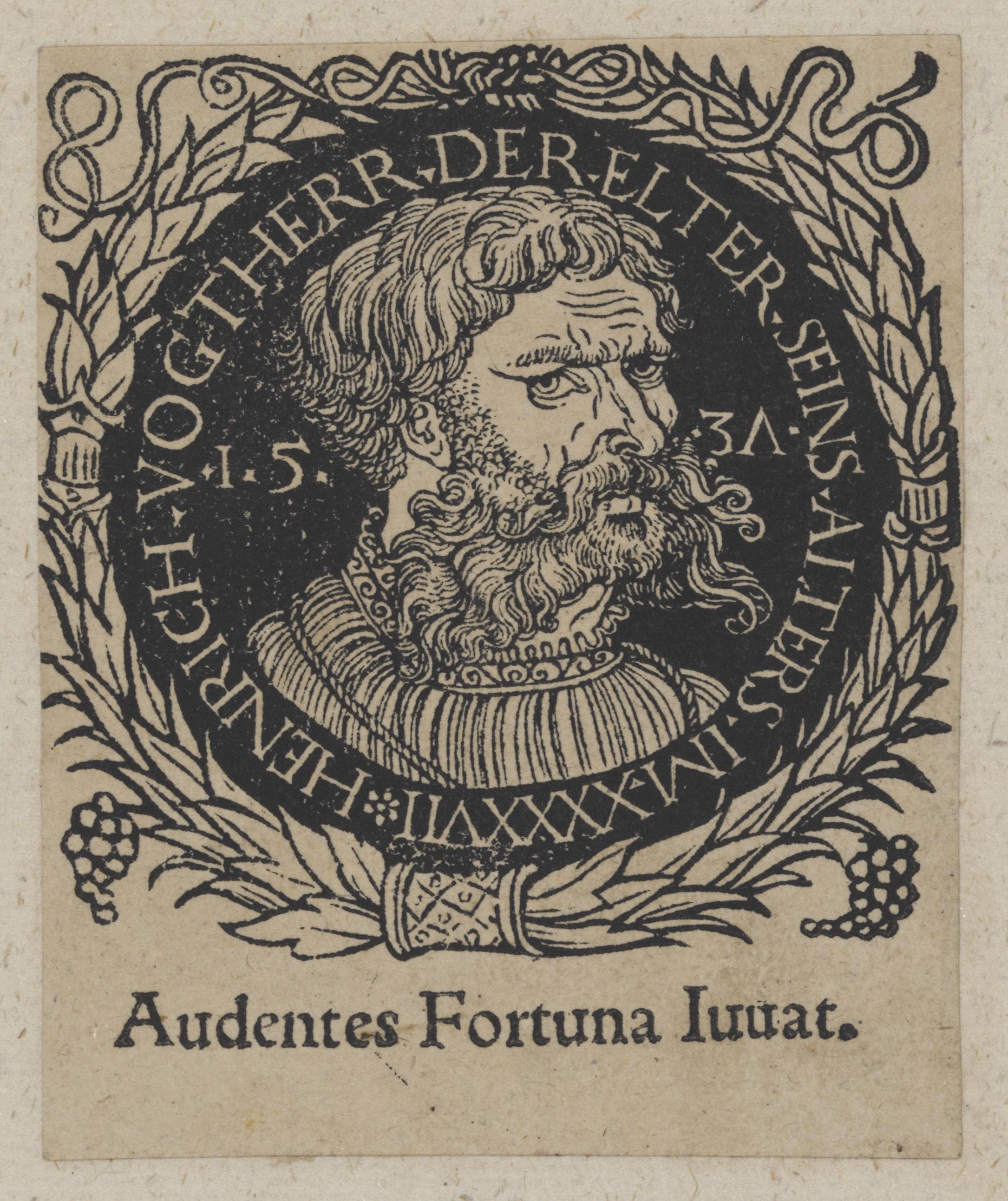 Bildnis Heinrich Vogtherr des Älteren – Bildumschrift: HENRICH · VOGTHERR · DER · ELTER · SEINS · ALTERS · IM · XXXXVII – Bildunterschrift: Audentes Fortuna Iuvat. – Holzschnitt 69 × 58 mm (2.72 × 2.28 in)